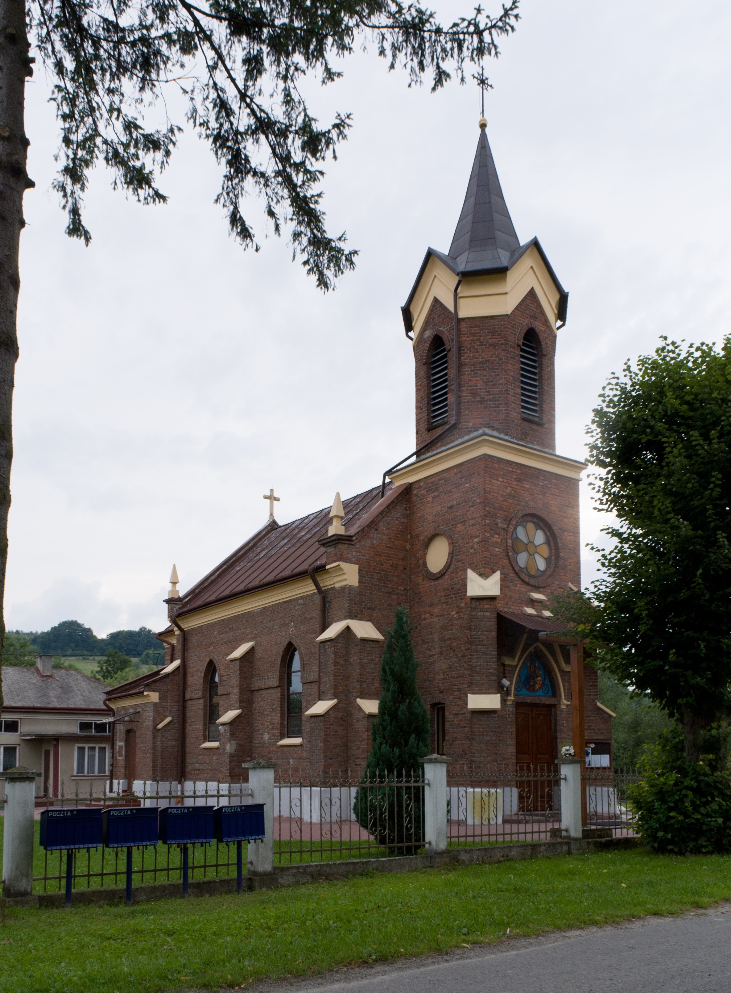 Kościół pw. św. Stanisława Kostki w Łętowni (powiat przemyski), murowany, z lat 1910-14